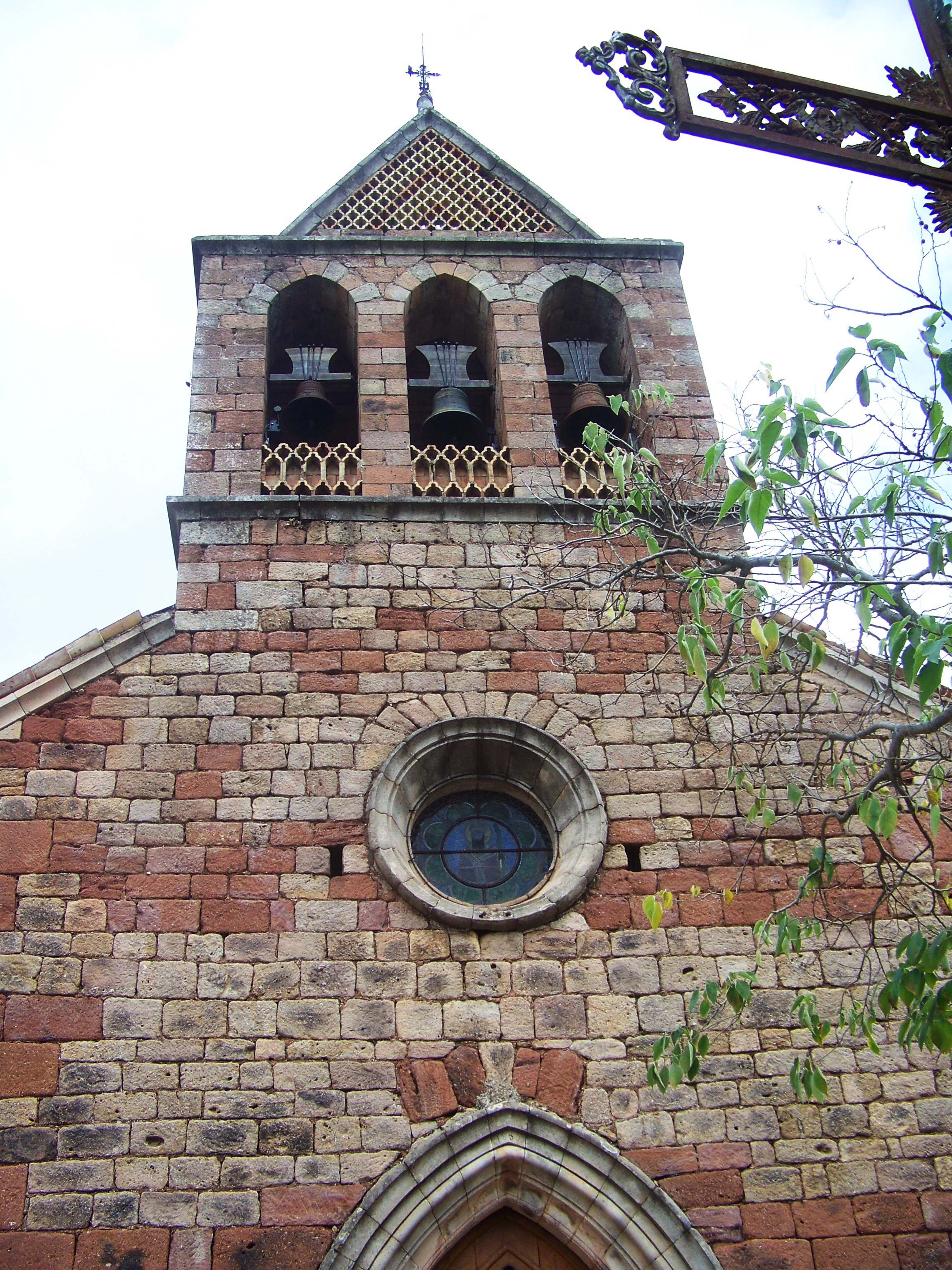 Belle église à proximité de Faugères (Ardèche)